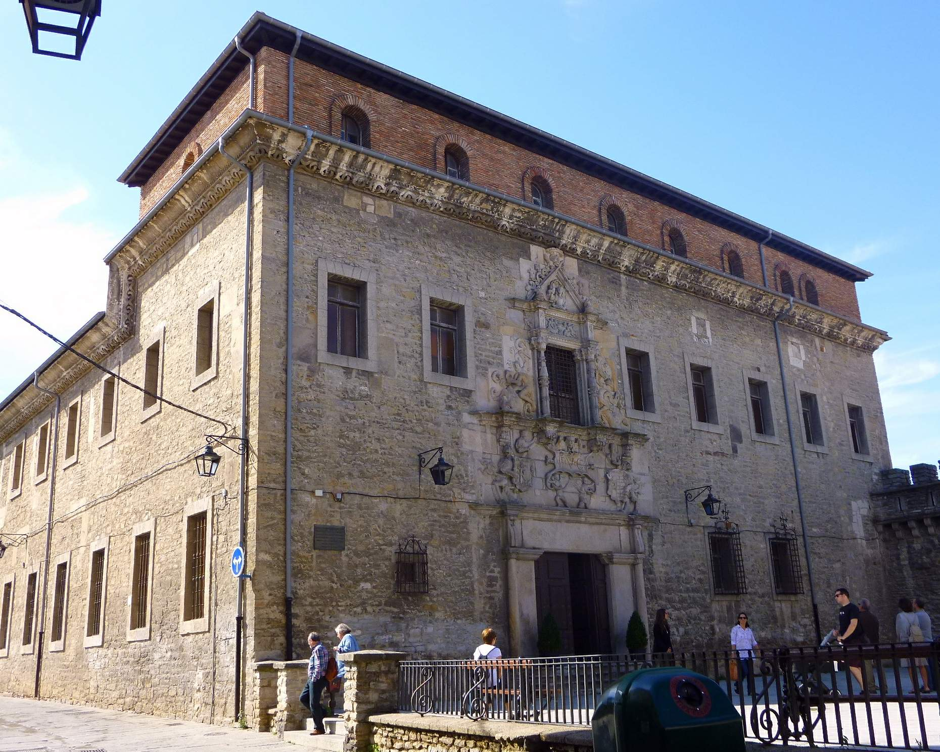 Palacio Eskoriaza-Eskibel (Vitoria)